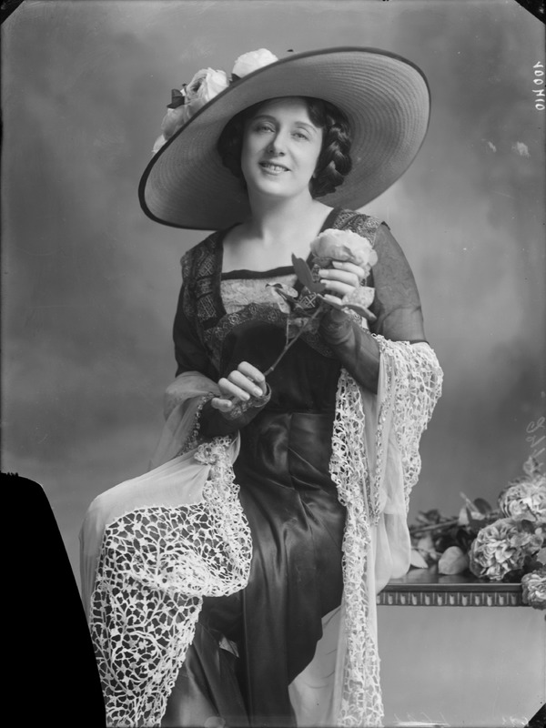 Tina Di Lorenzo fotografata da Mario Nunes Vais